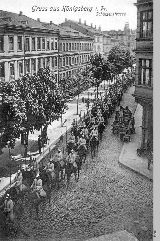 Königsberg